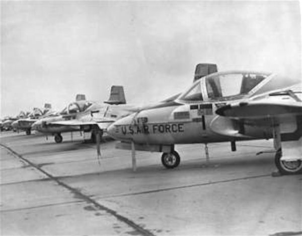 T-37s at Vance AFB, Oklaholma, 1971